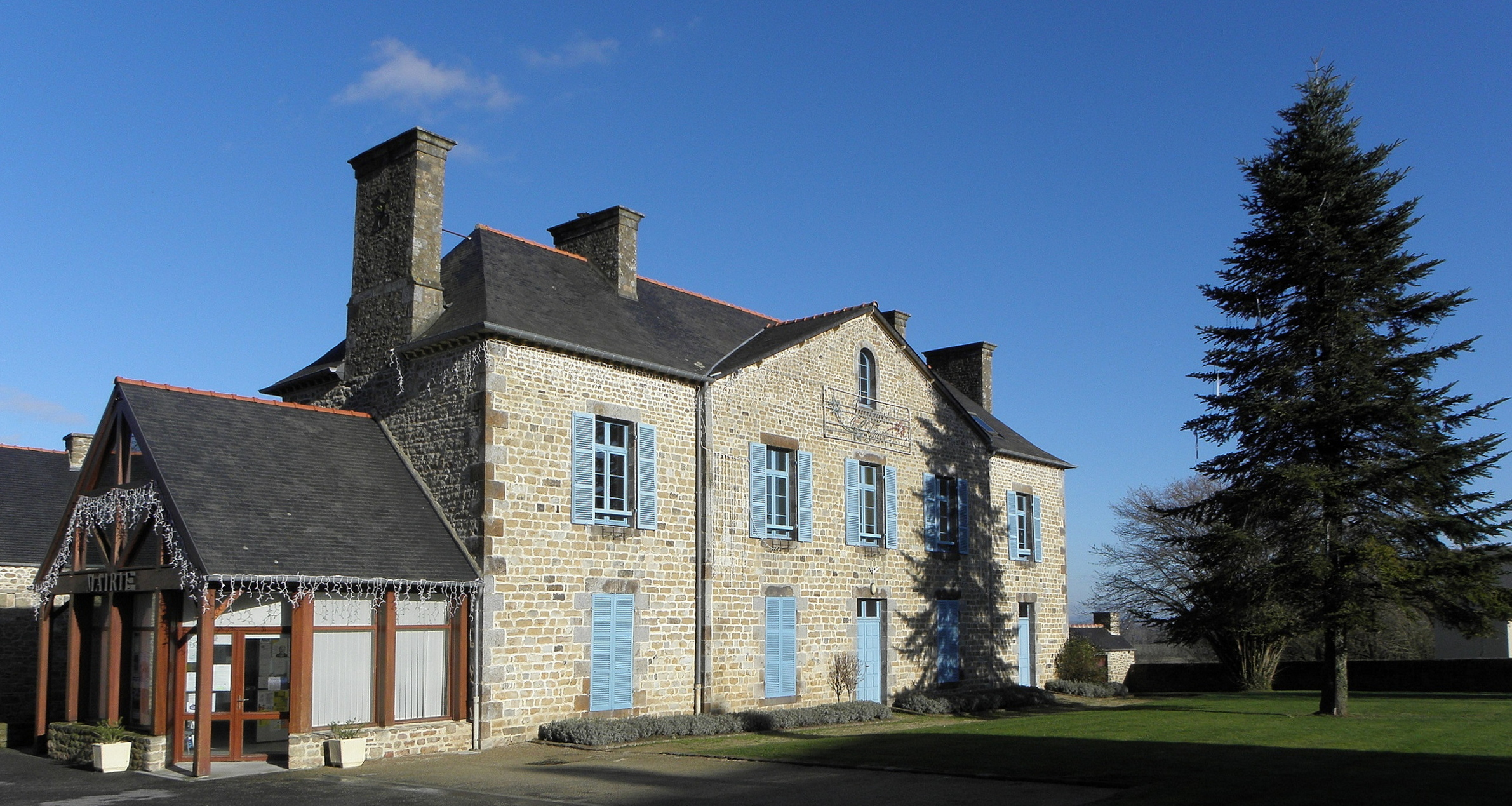 Mairie de Roz-sur-Couesnon (35).